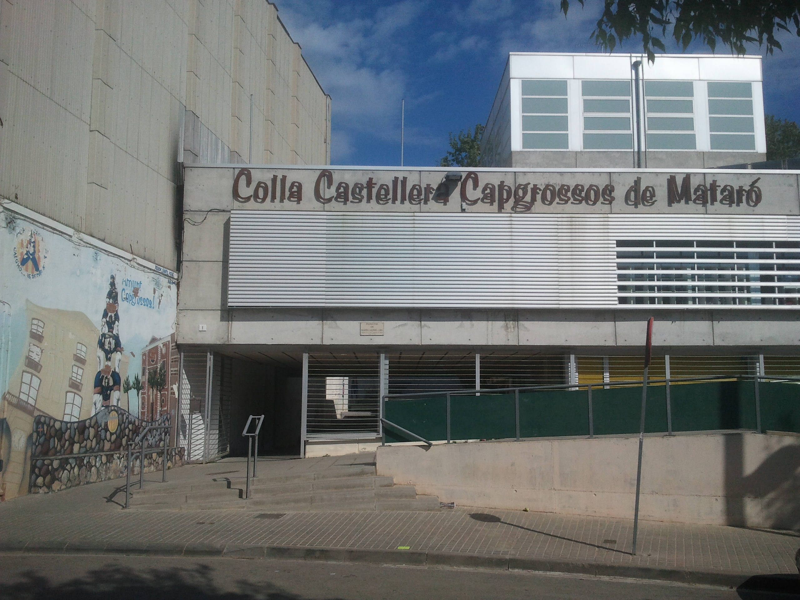 Local de la Colla Castellera Capgrossos de Mataró.